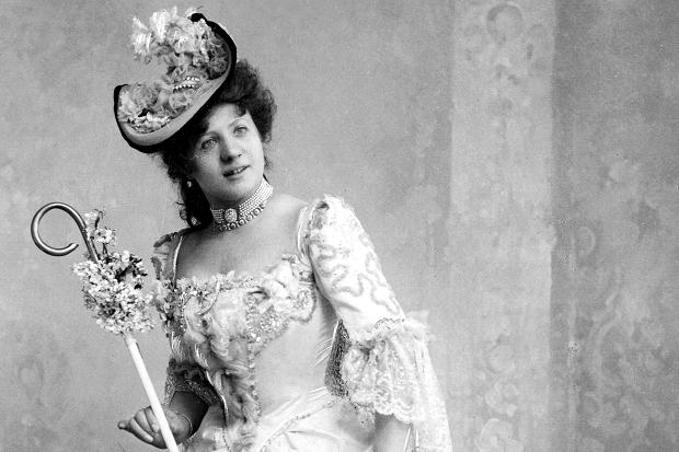 Antonietta Dell'Era Reichard & Lindner Ausschnitt